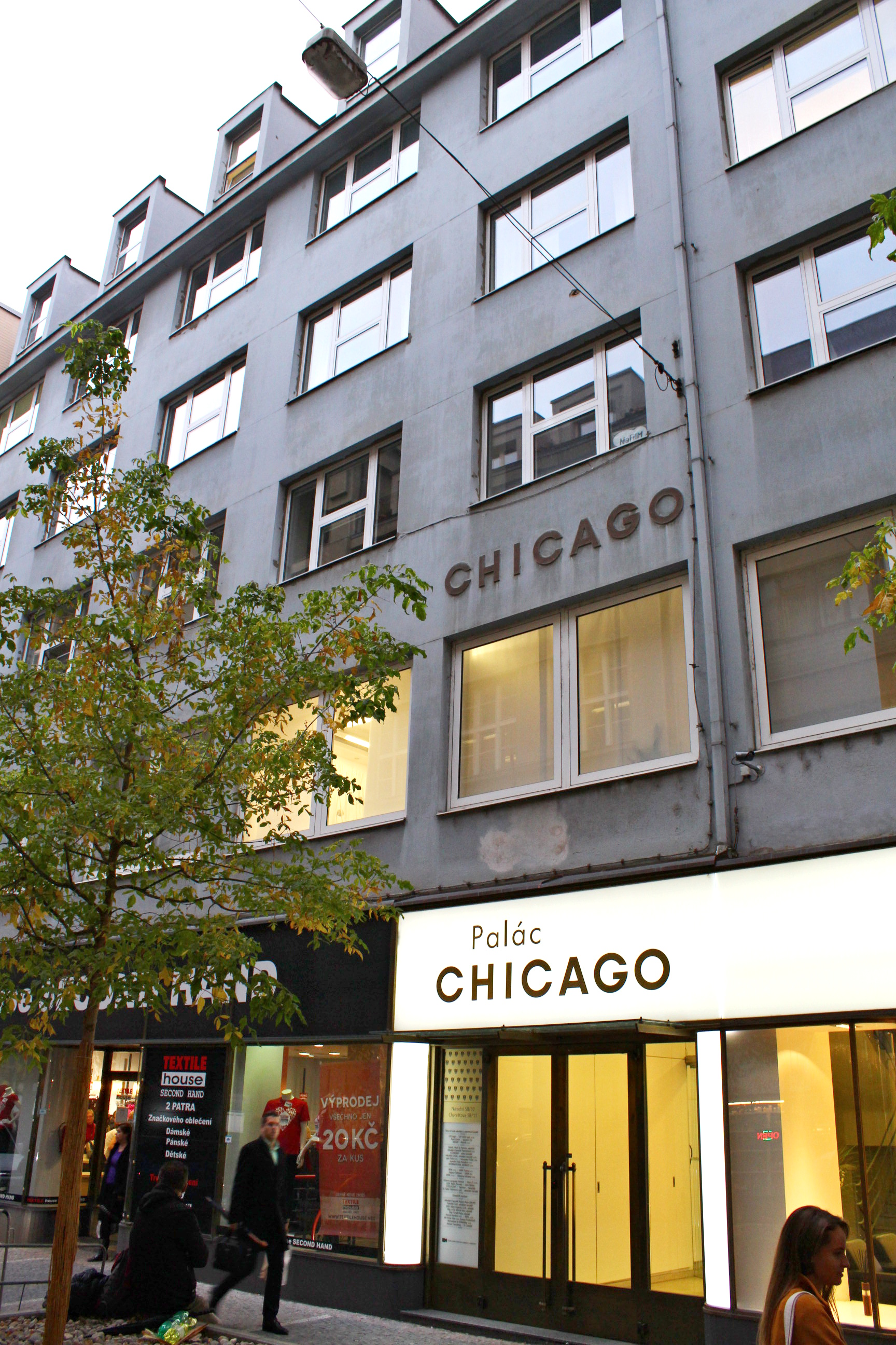 Kolowratovy domy: Palác Chicago